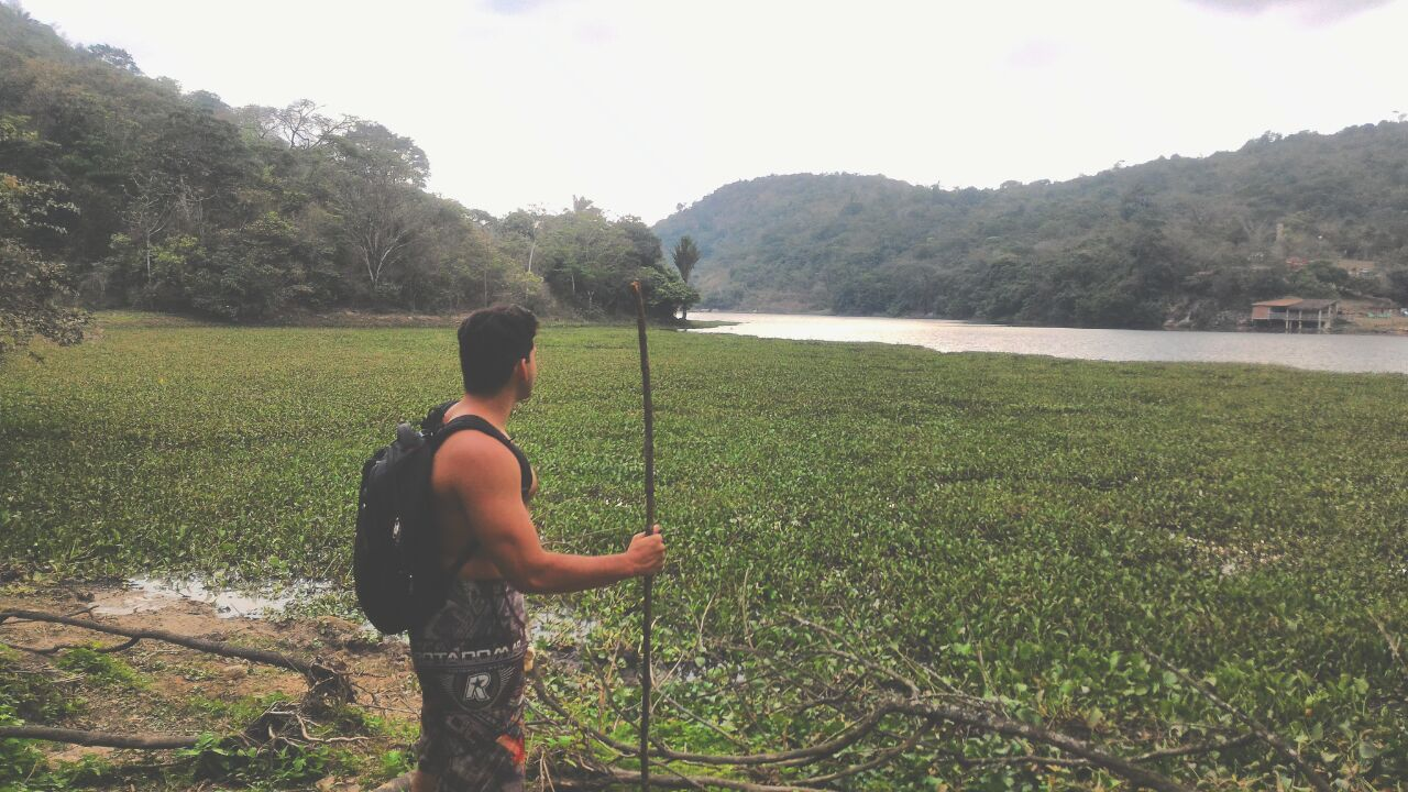 Turismo feito no Itamatamirim Parque